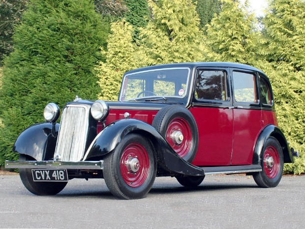 1935 Armstrong Siddeley Fourteen Saloon (DVLA) first registered , 31 December 1935, 1694 cc